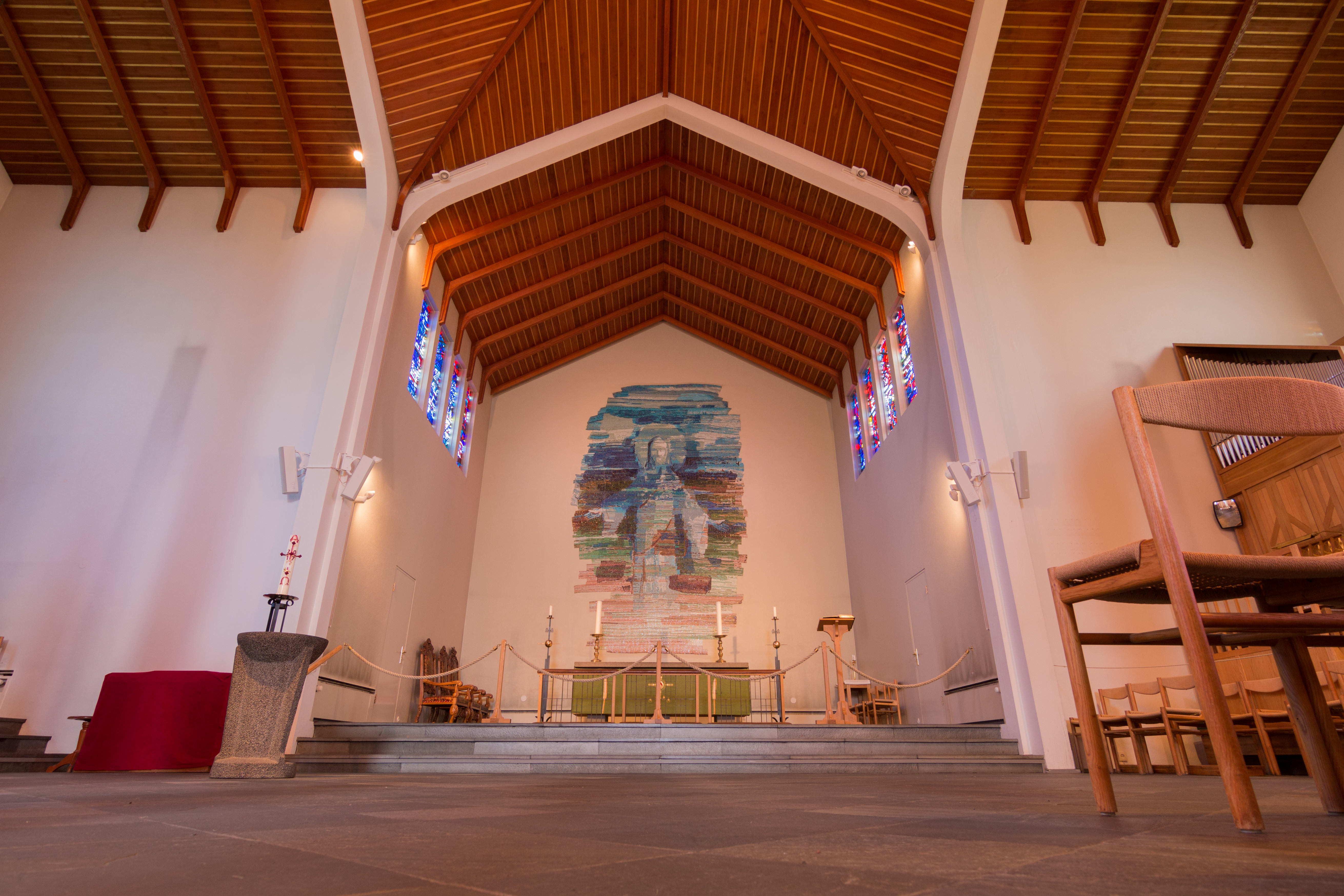 Interior of Skálholtskirkju